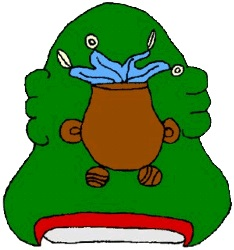 Glifo de Mineral del Chico, Hidalgo